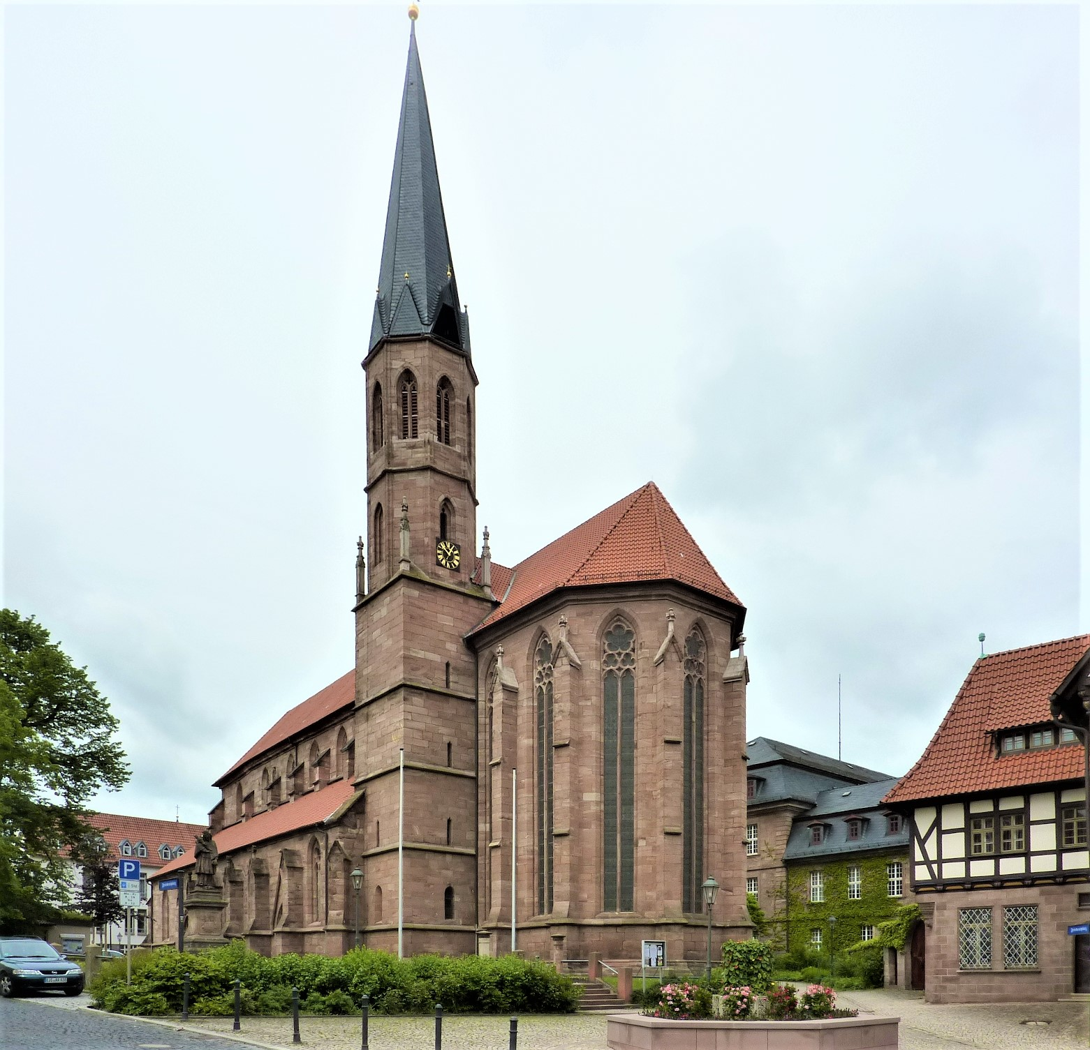 St.-Martin-Kirche Heilbad Heiligenstadt